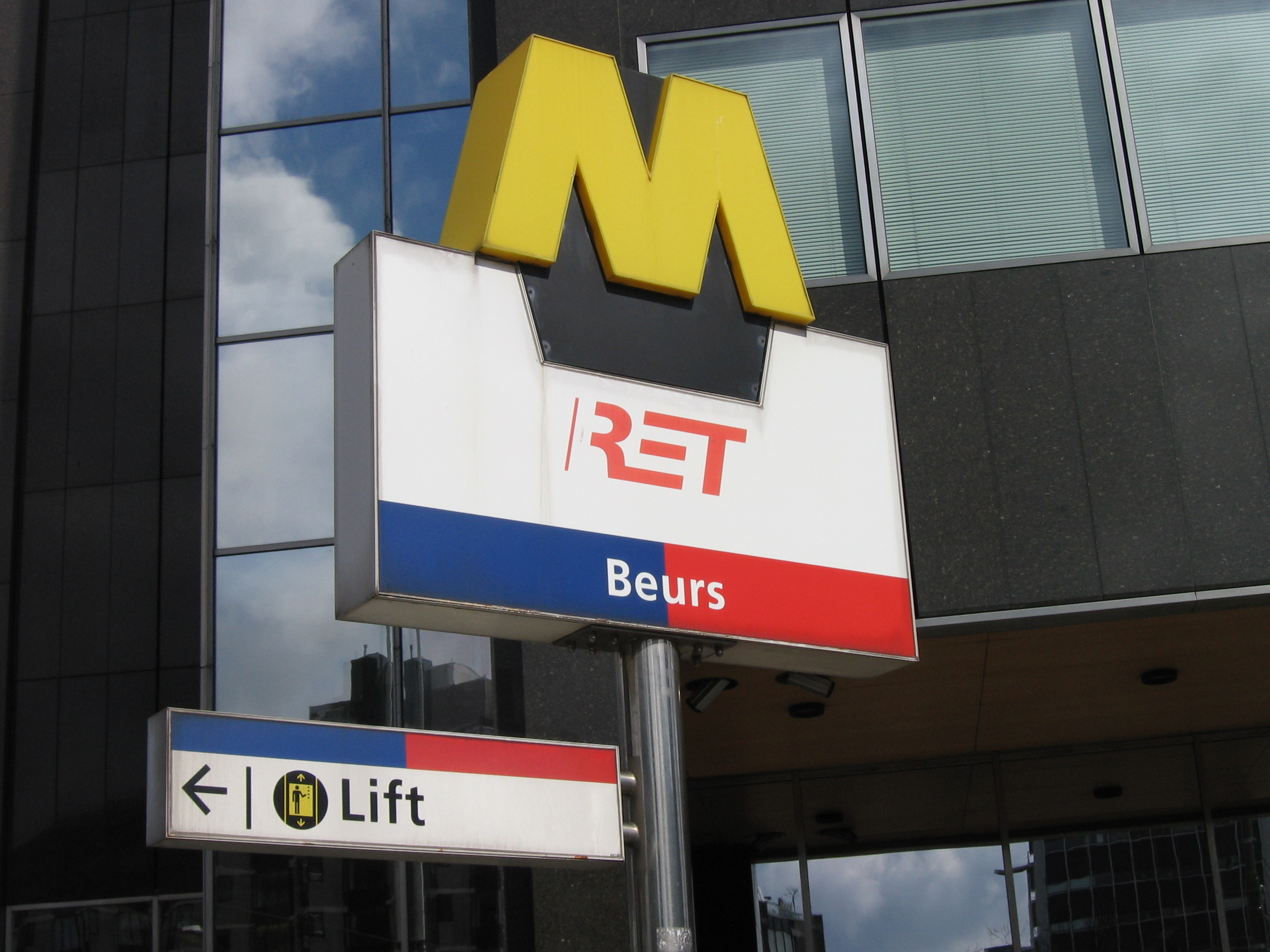 Één van de ingangen van RET metrostation Beurs, oude kleurstelling van het bord